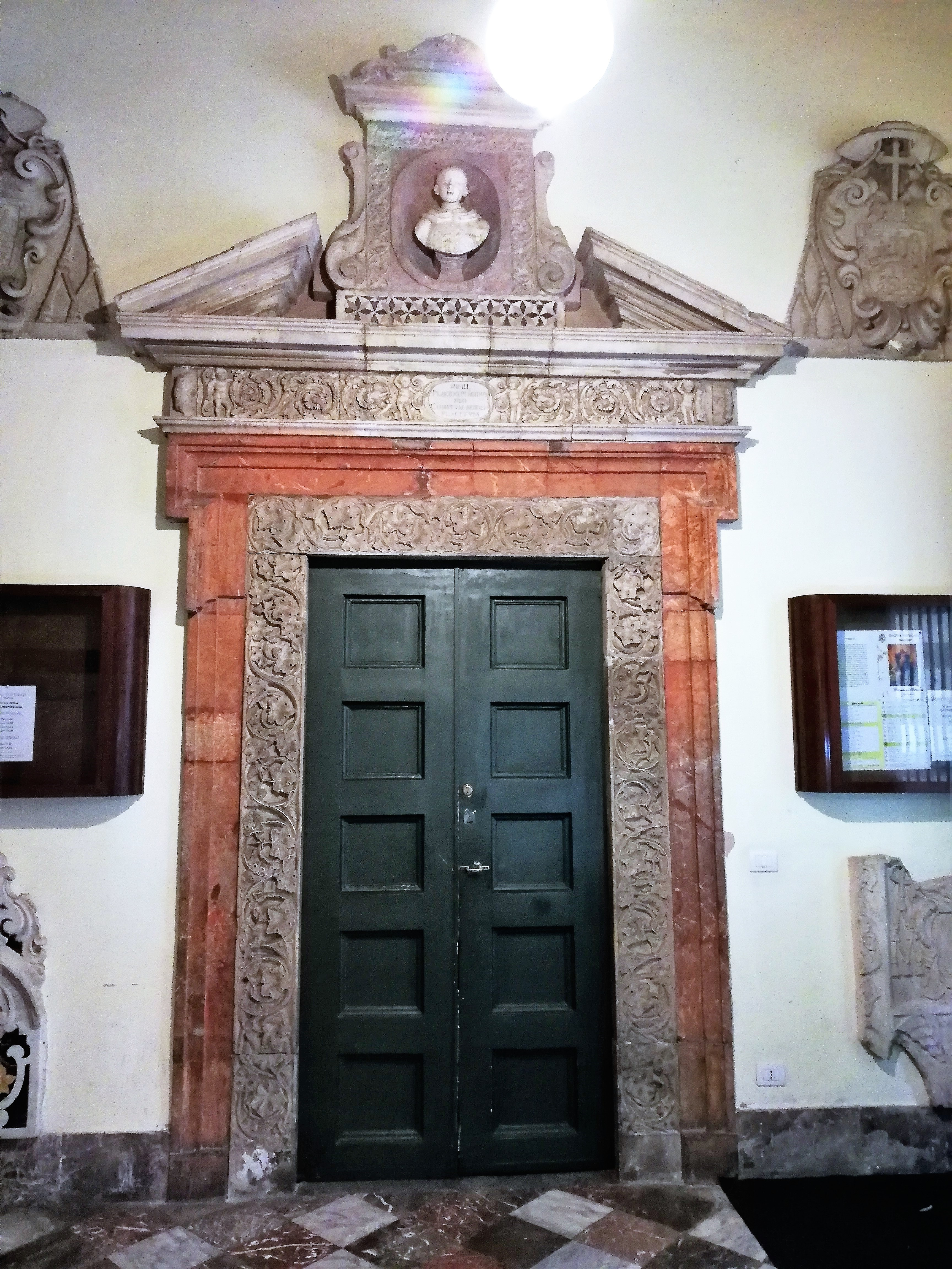 Portali vano sacrestie.